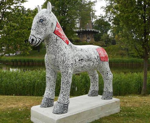 Beeld in Alkmaar, deel van het project 'De Paardenparade' van de gelijknamige stichting die inmiddels is opgeheven.